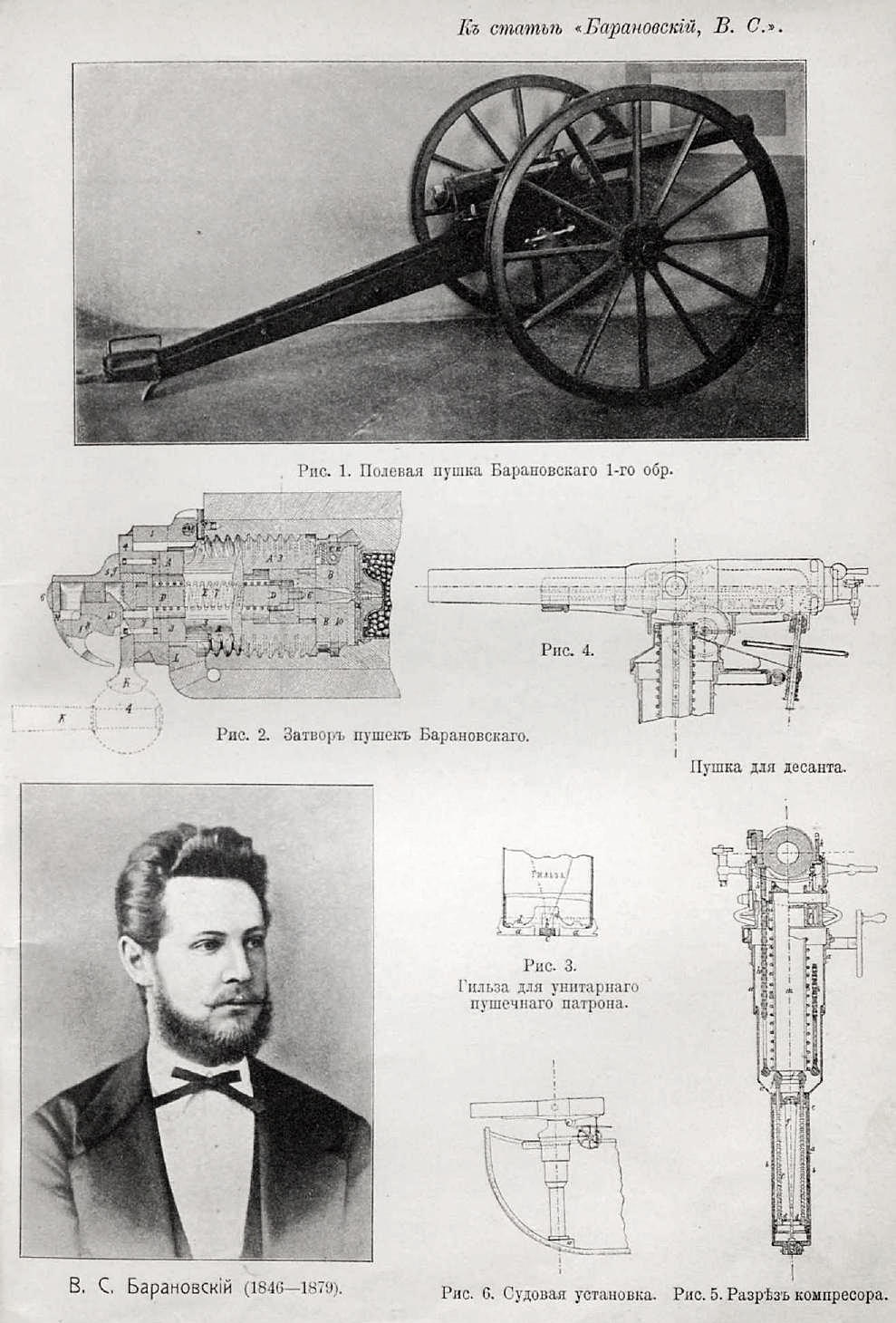 Данное изображение было использовано в статье «Барановский, Владимир Степанович» опубликованной в четвёртом томе «Военной энциклопедии», который был издан книгоиздательским товариществом Ивана Дмитриевича Сытина в 1911 году в столице Российской империи городе Санкт-Петербурге.